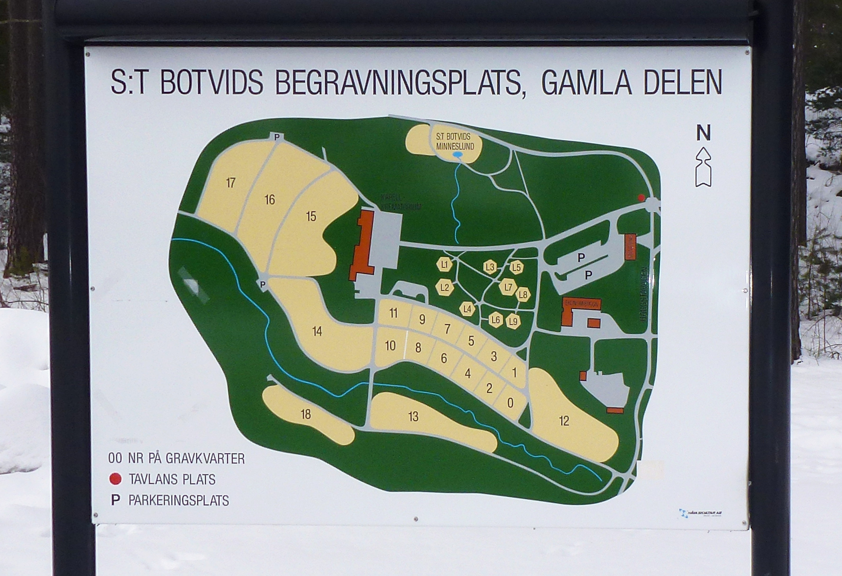 Sankt Botvids begravningsplats skylt